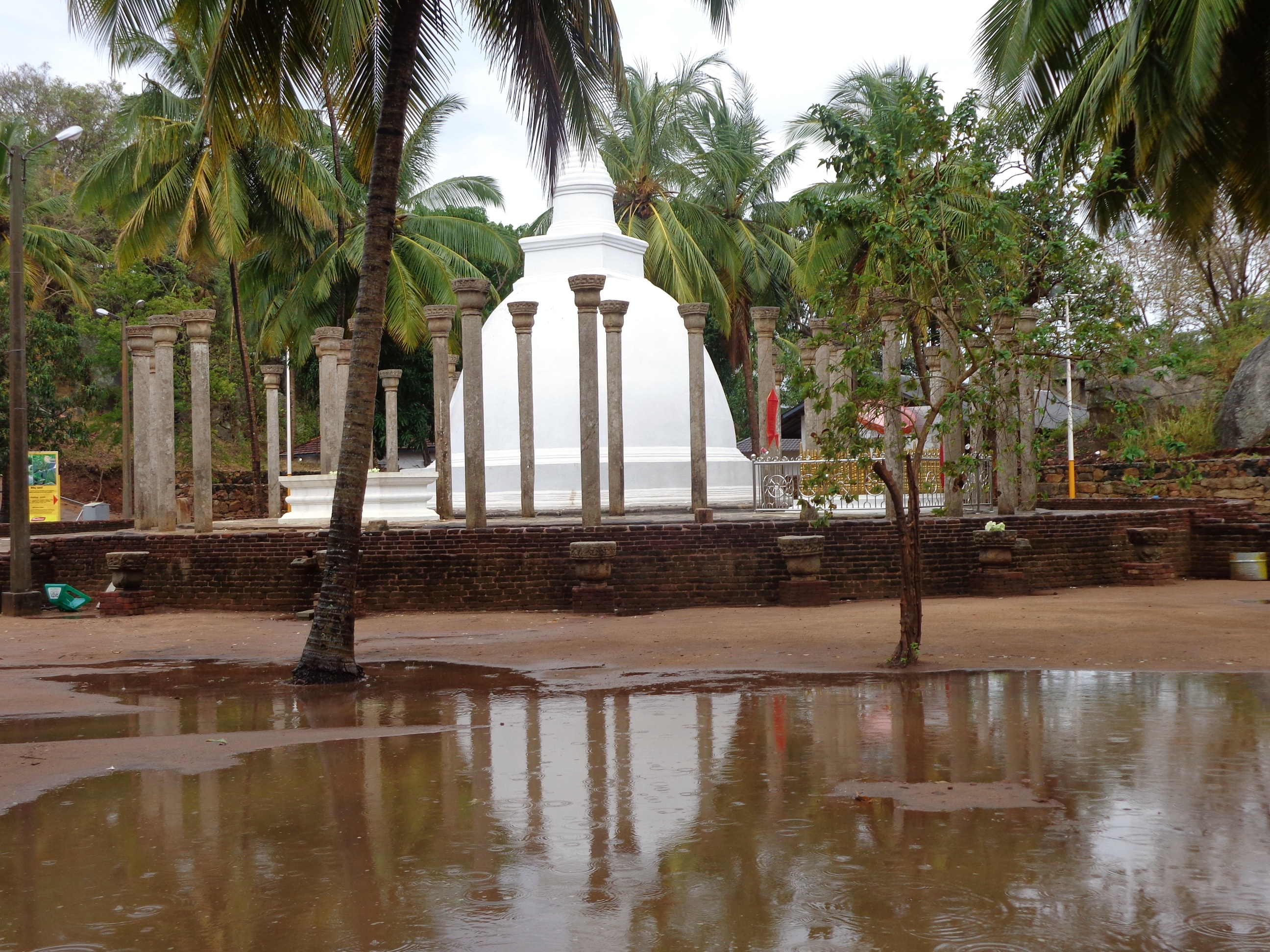 MIHINTALE